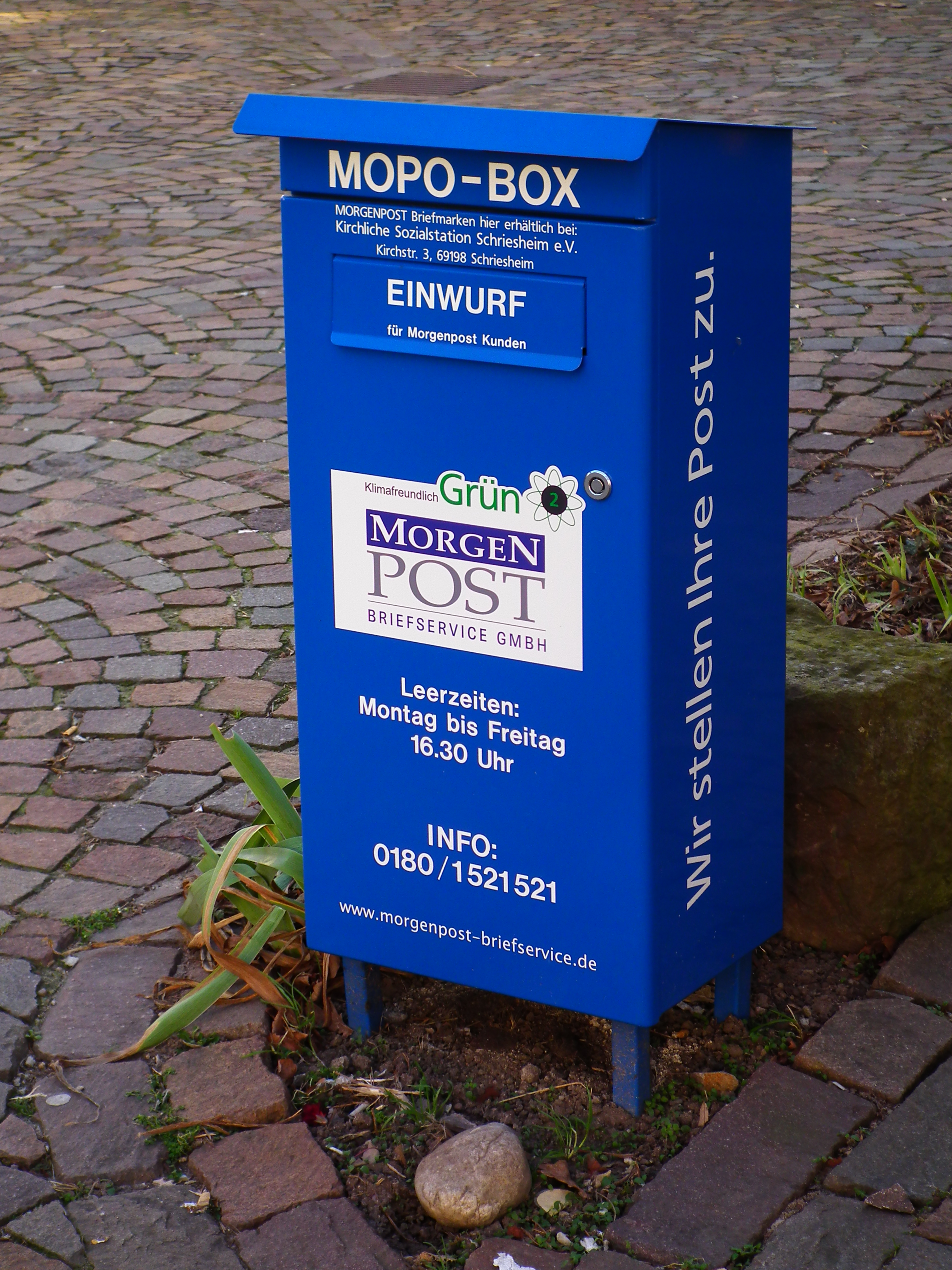 Mopo-Box in Schriesheim (Baden-Württemberg, Deutschland)